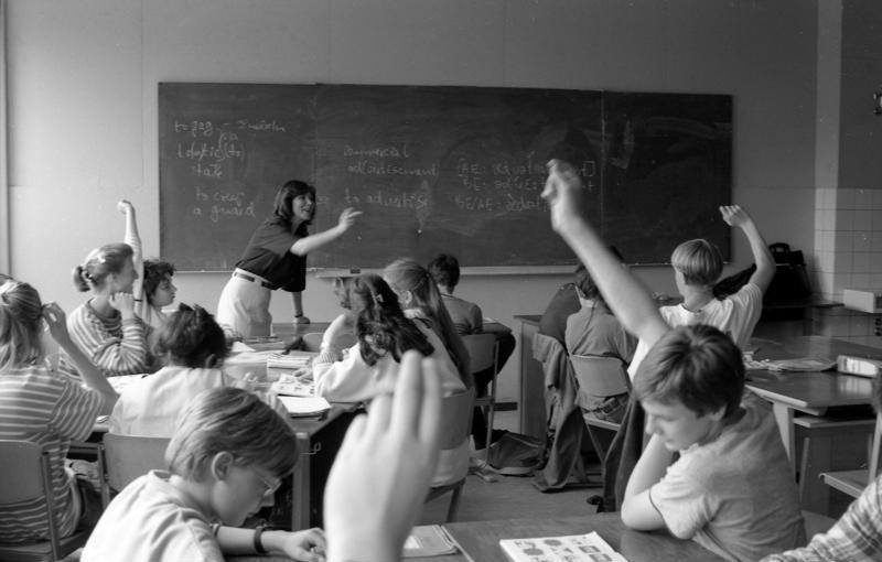 Juni 1988 Bonn Gymnasium - Englischunterricht